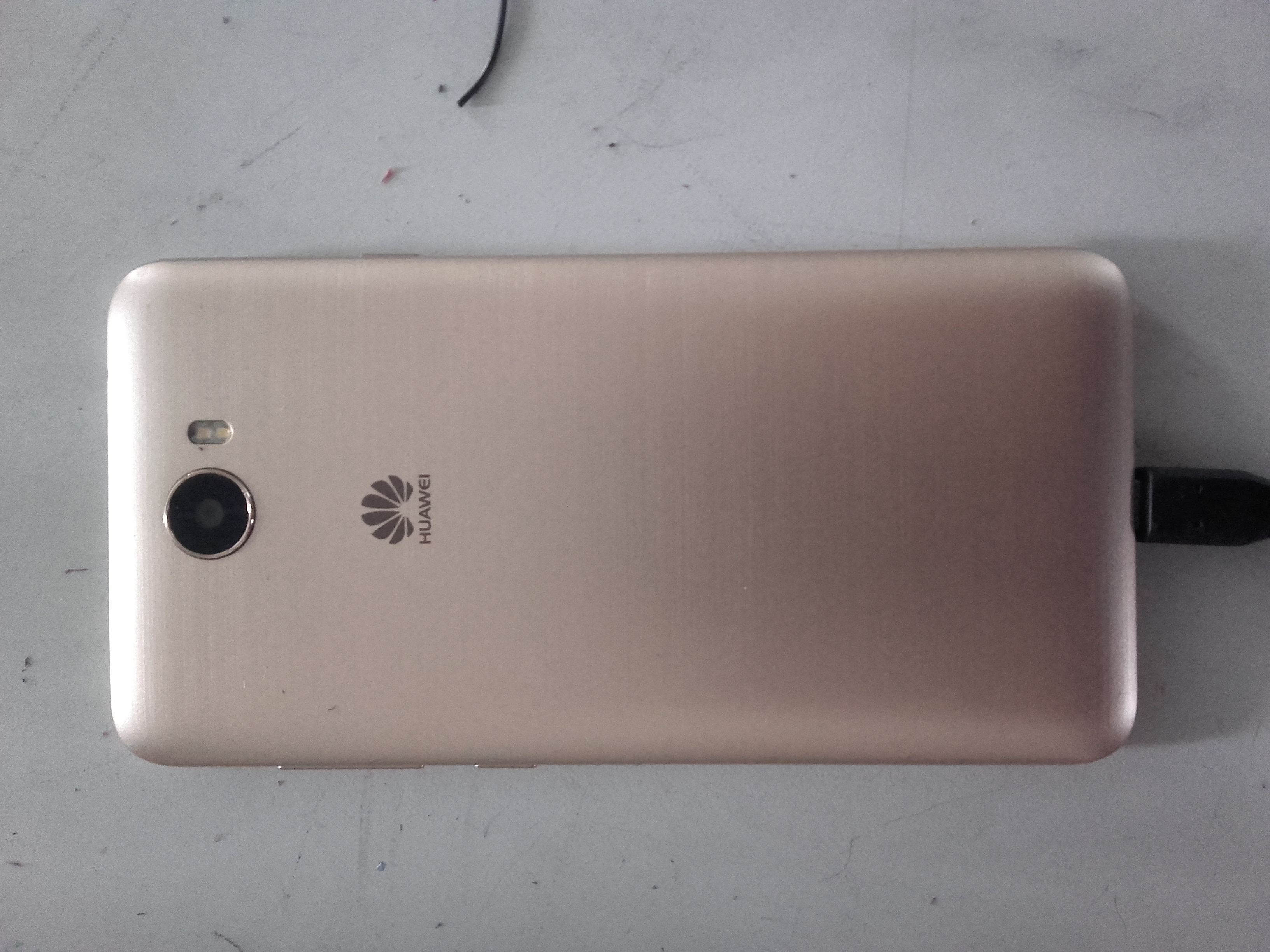 nfjfnfnfnfmfnf